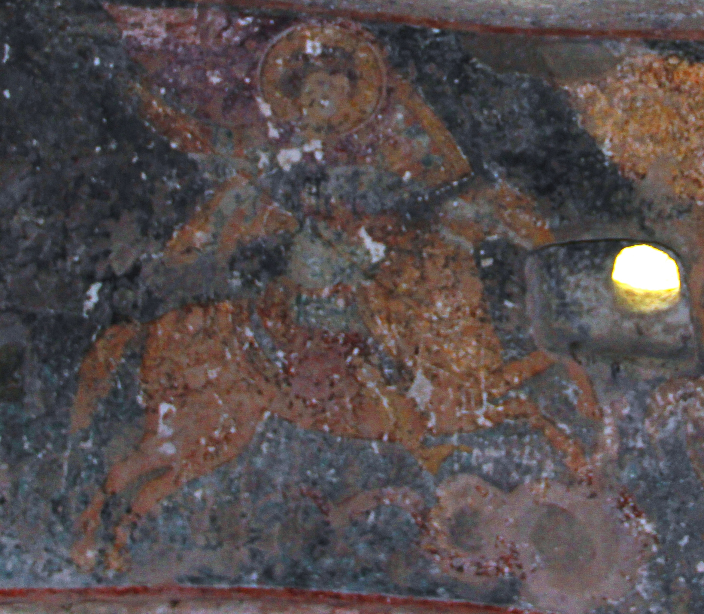 Фрески Храма Трех всадников. Эски-Кермен. Бахчисарайский р-н. Крым. Россия. Сентябрь 2014